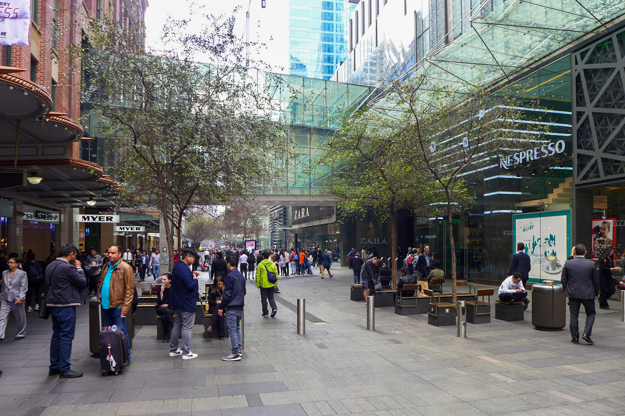 Pitt Street Mall